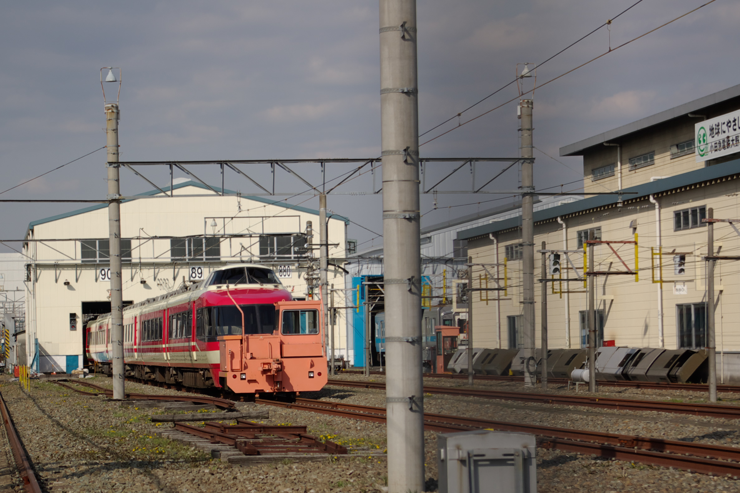 小田急線相模大野駅に隣接する大野工場。林間公園付近から金網越しに撮影。